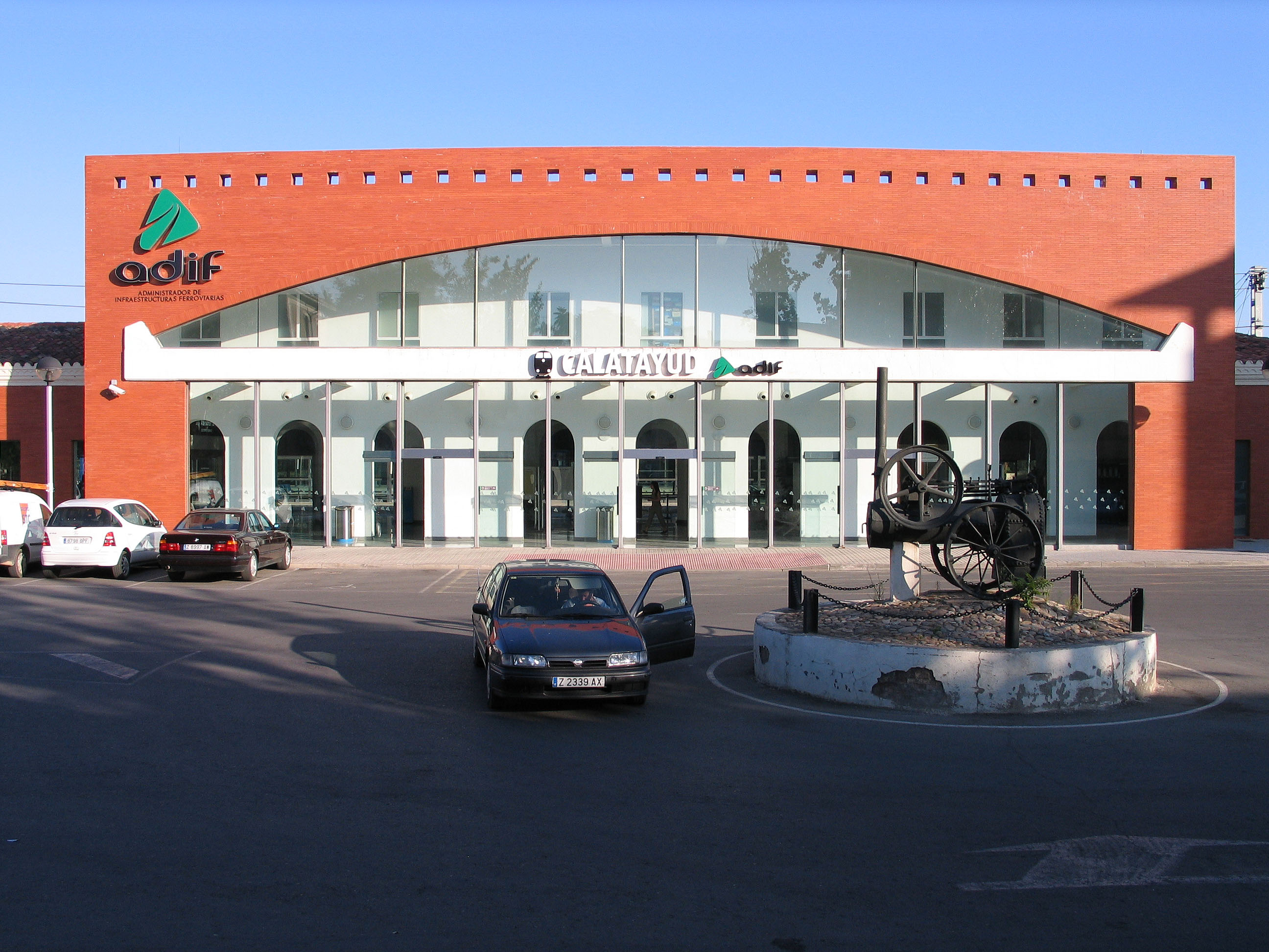 Calatayud, Estación Adif de Calatayud (antes de RENFE).